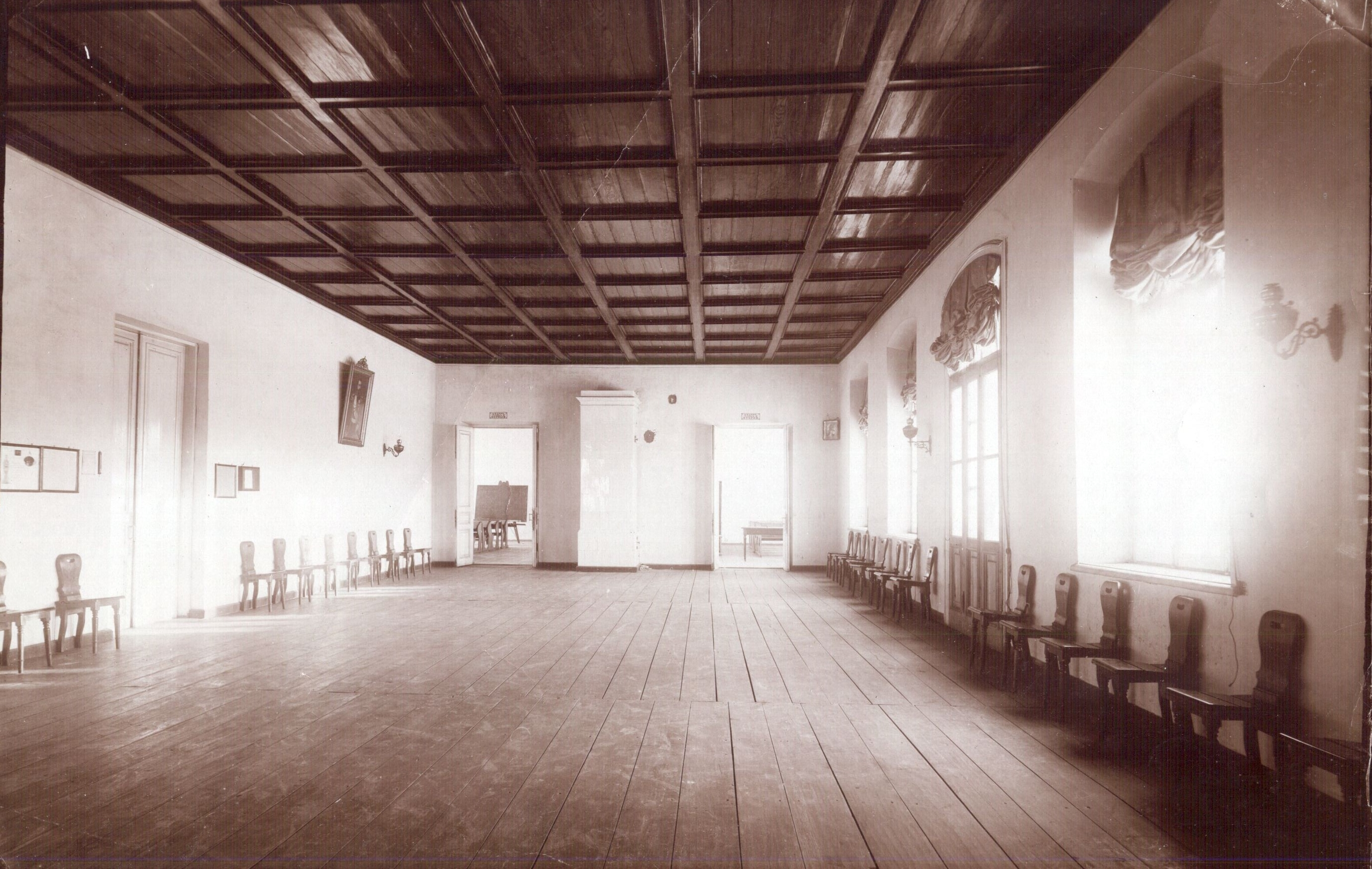 Коридор другого поверху училища 27 липня 1898 р.